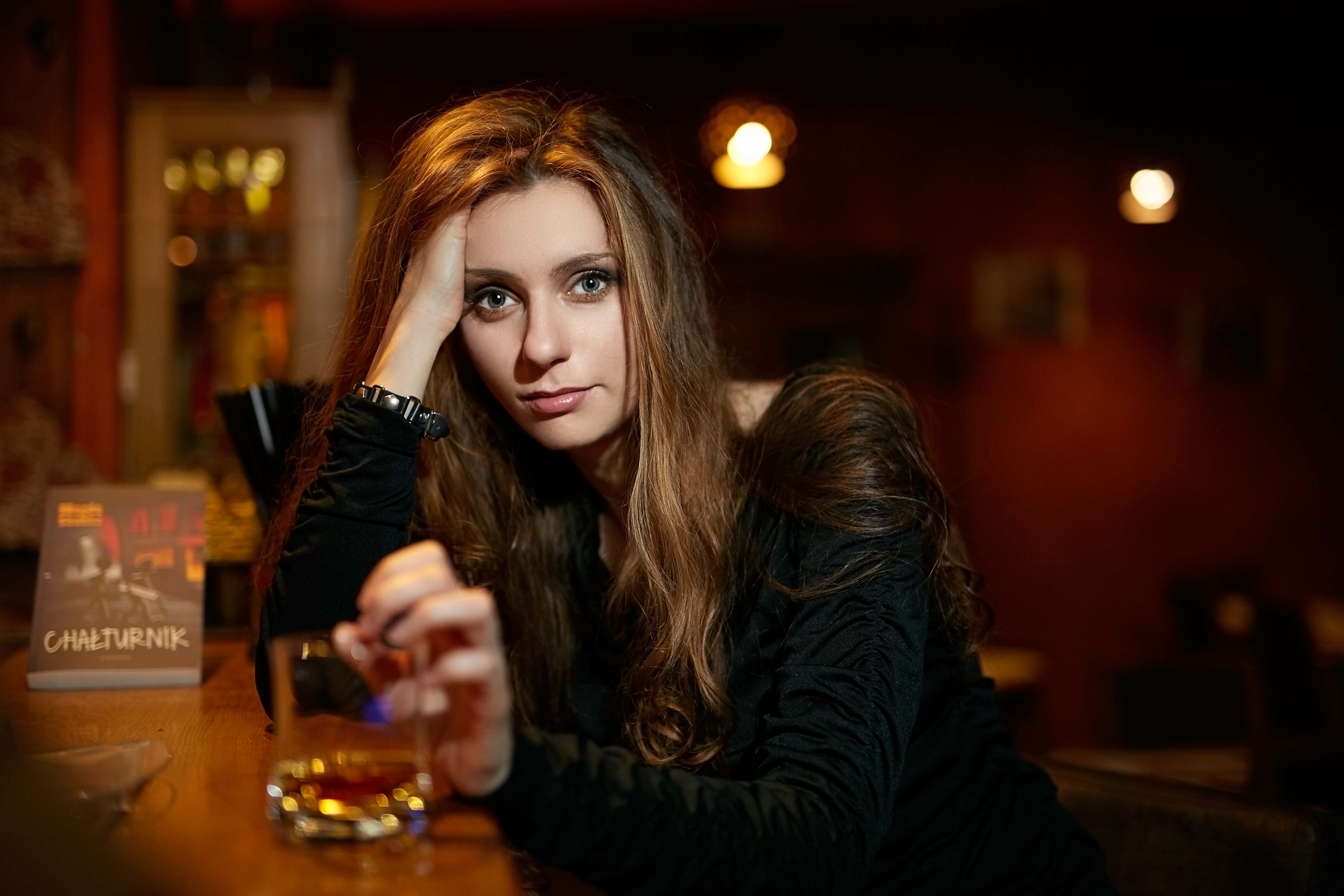 Magda Skubisz w przemyskiej kawiarni "Libera" Foto: Robert Podwyszyński